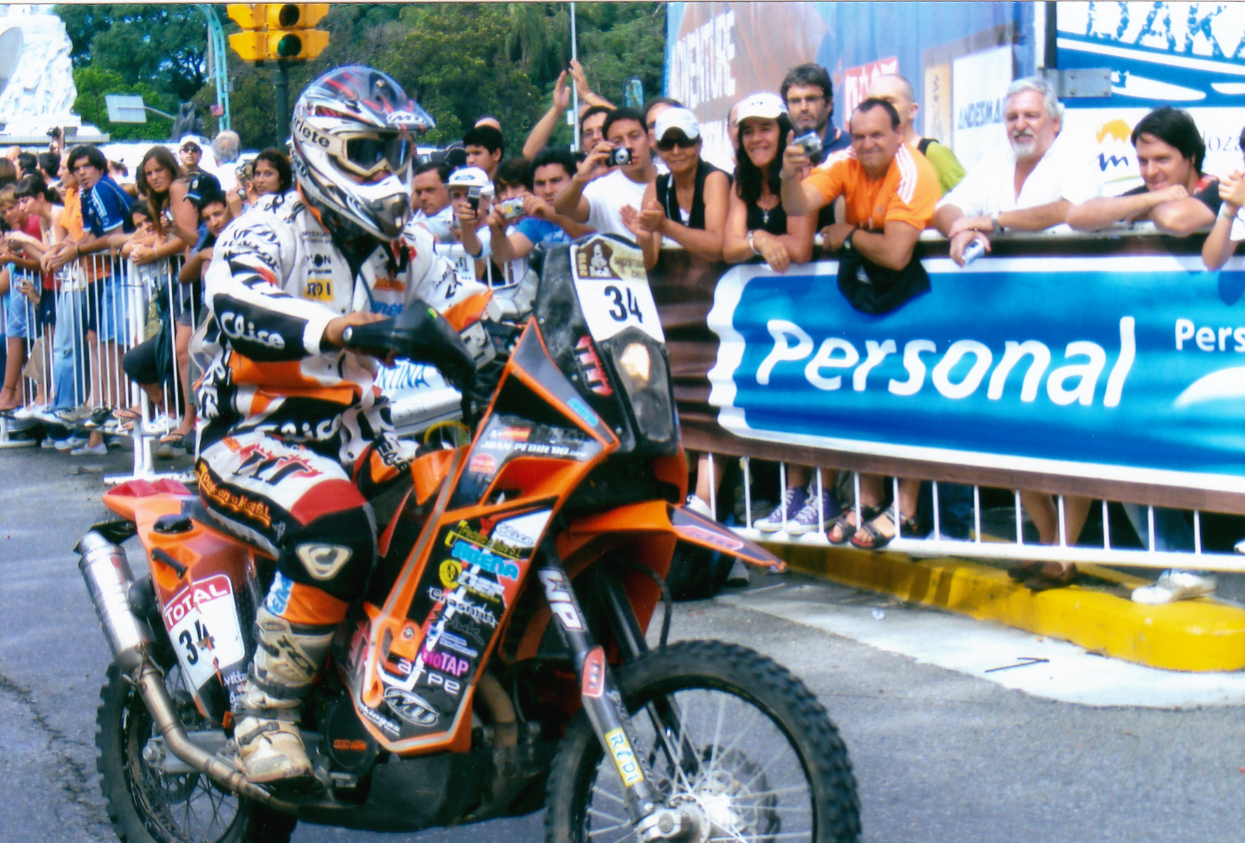 17. Januar 2010 Zieleinfahrt der Motorradfahrer. Am La Rural in Buenos Aires.